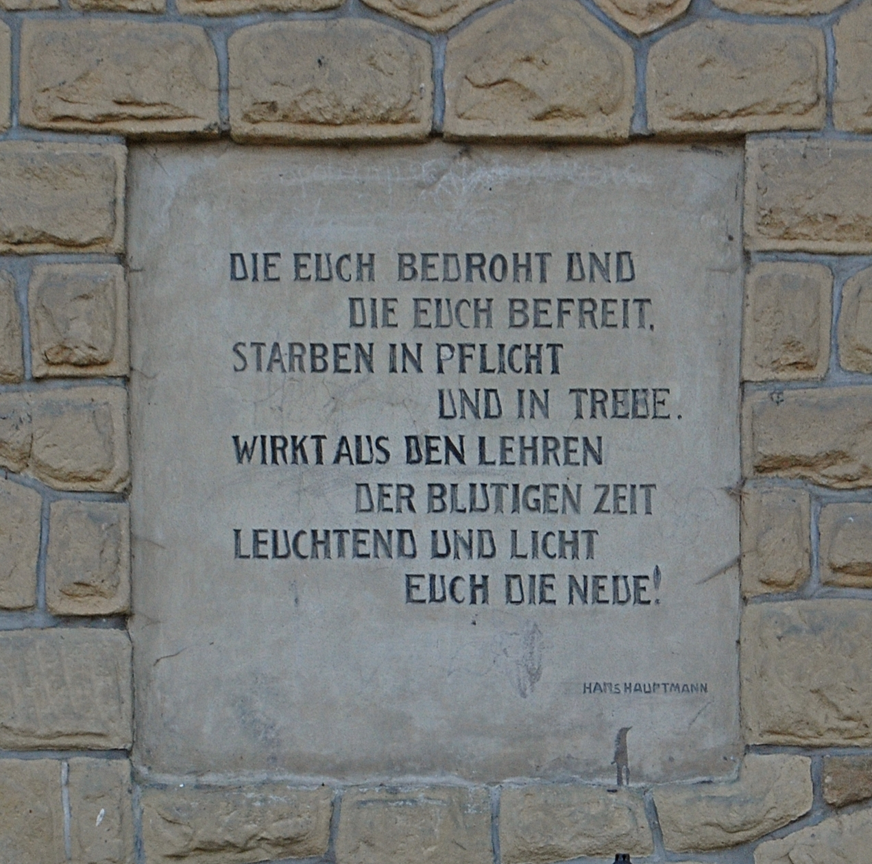 wieś Święcany